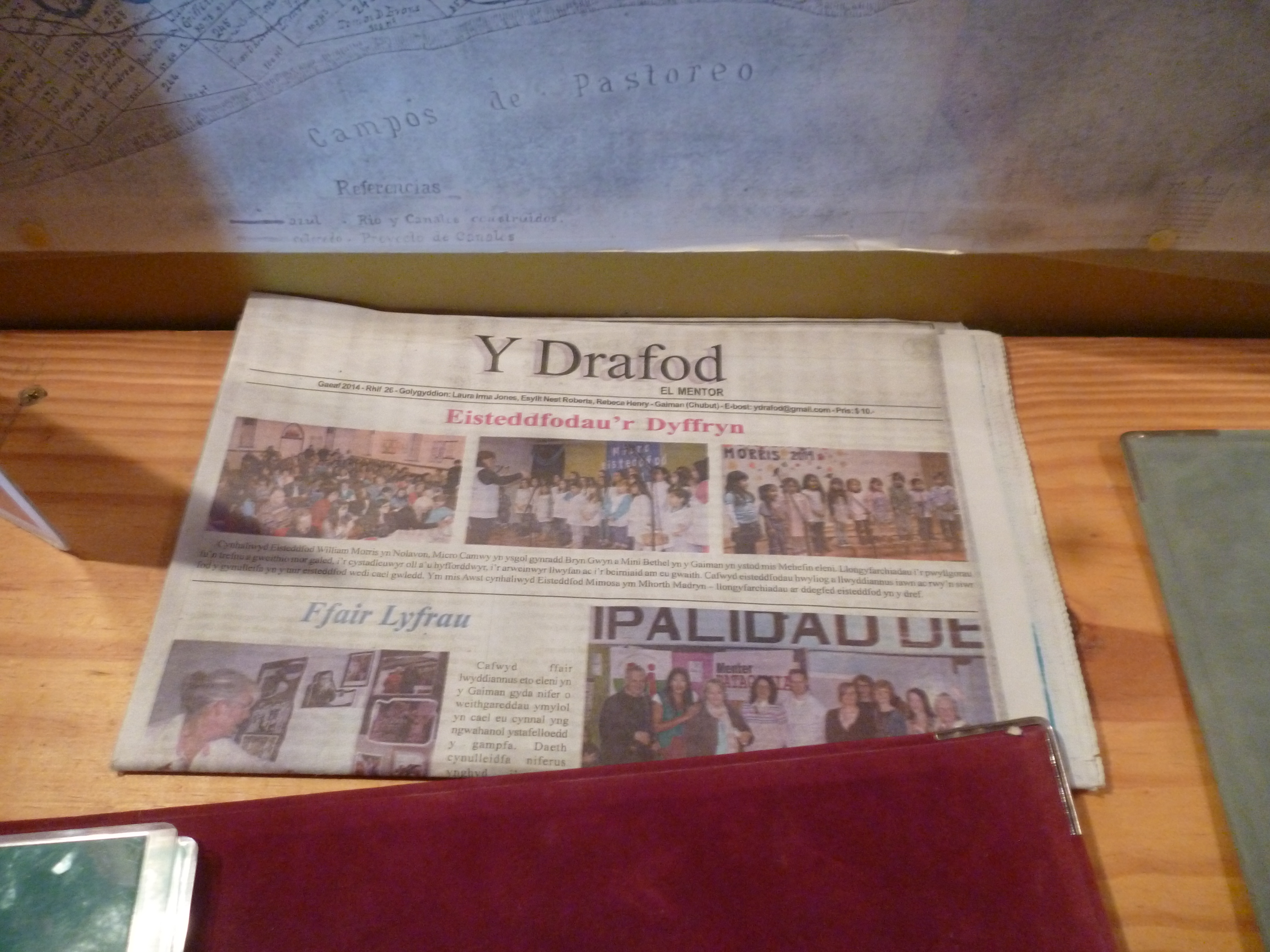 Y Drafod, Museo del Desembarco